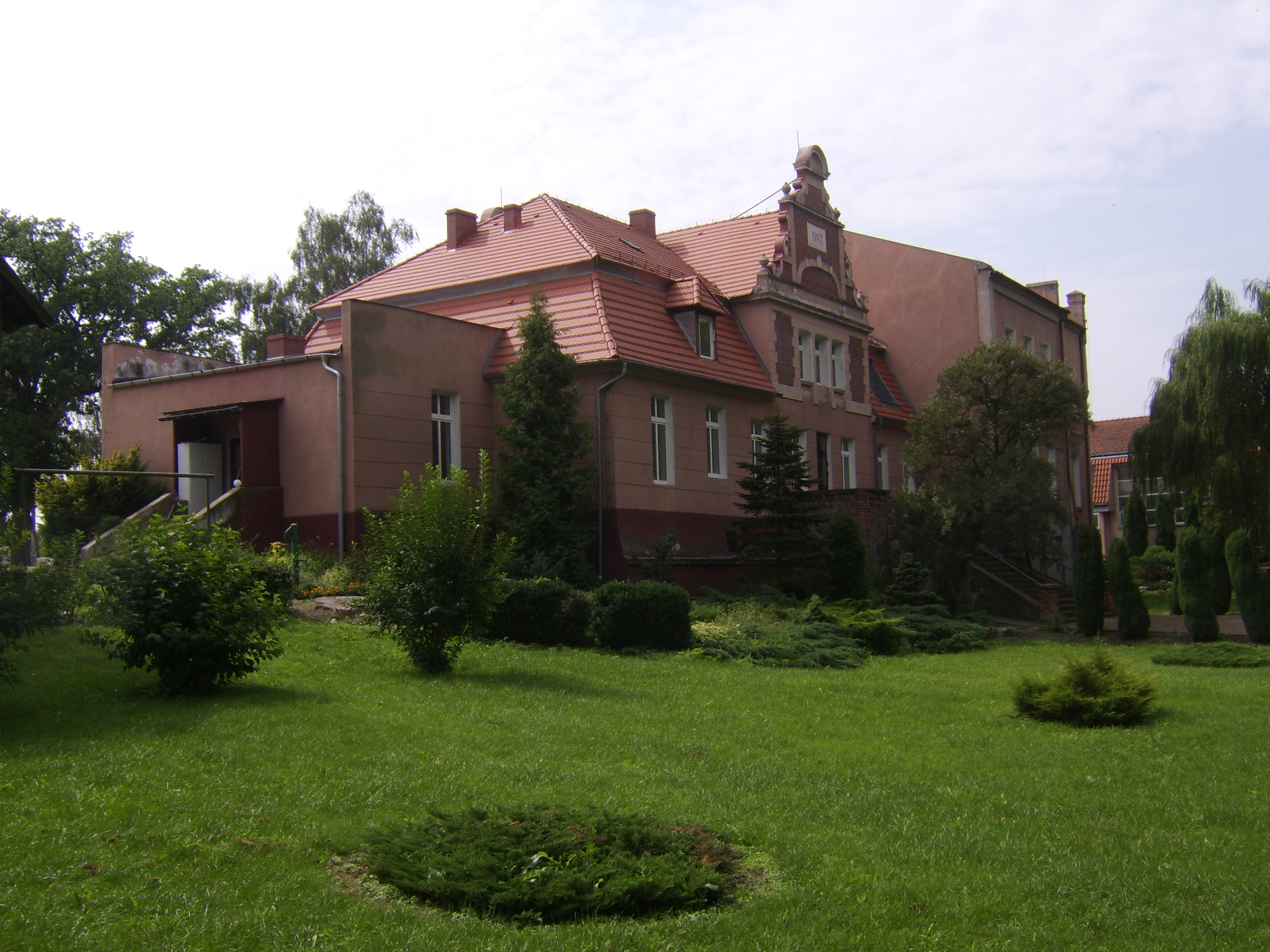 Pałac we wsi Ryńsk